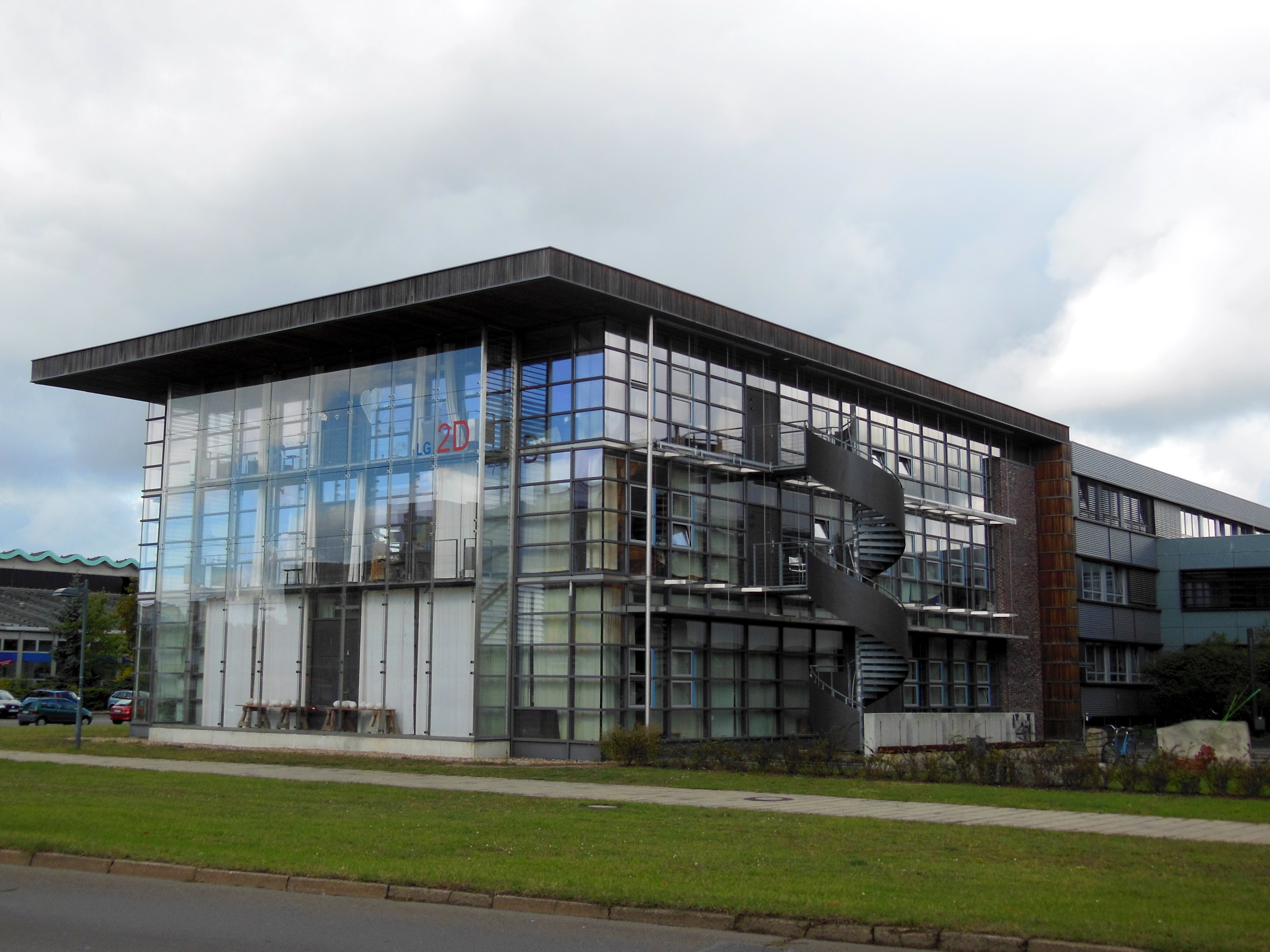 Lehrgebäude 2D der Brandenburgischen Technischen Universität Cottbus